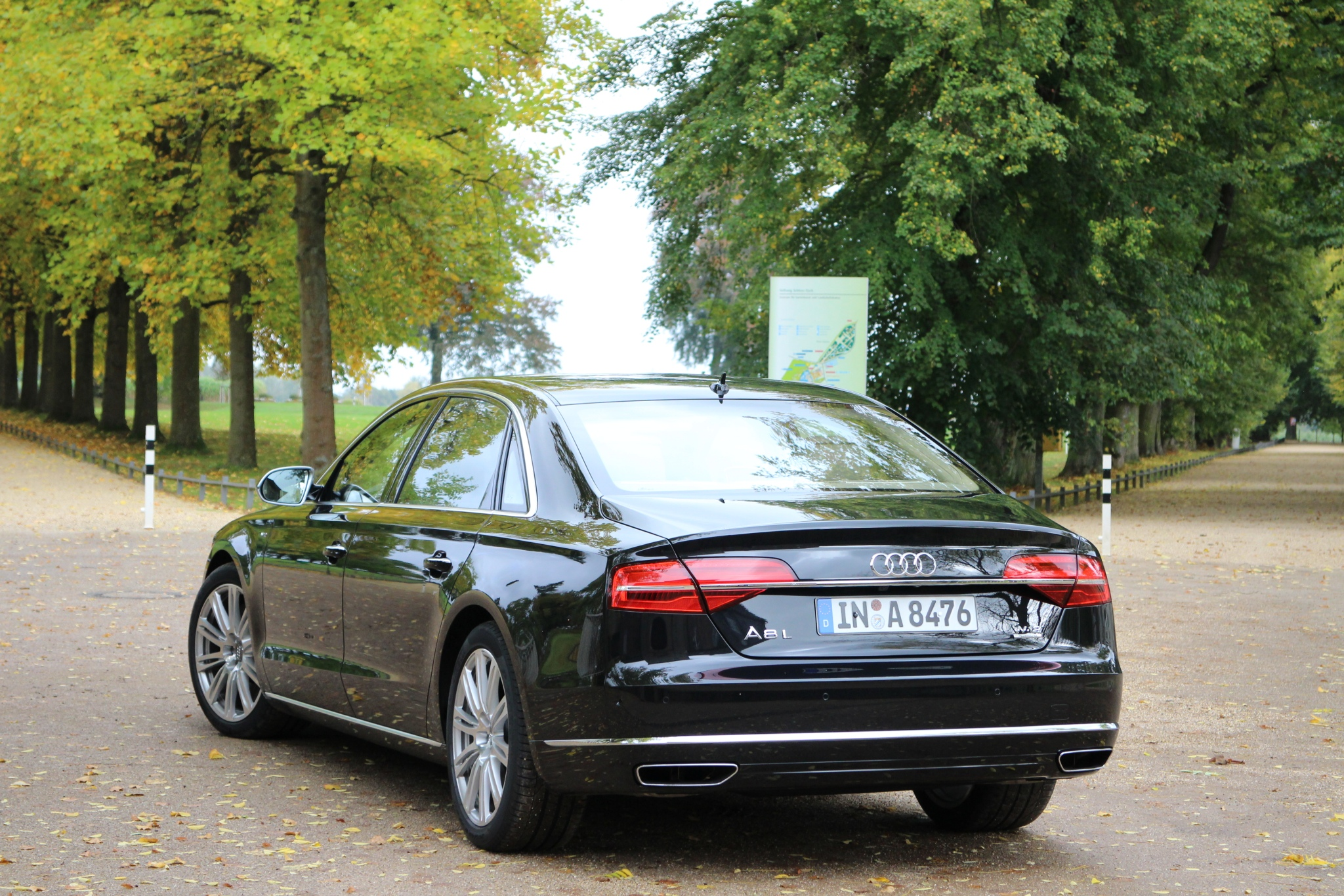 Facelift